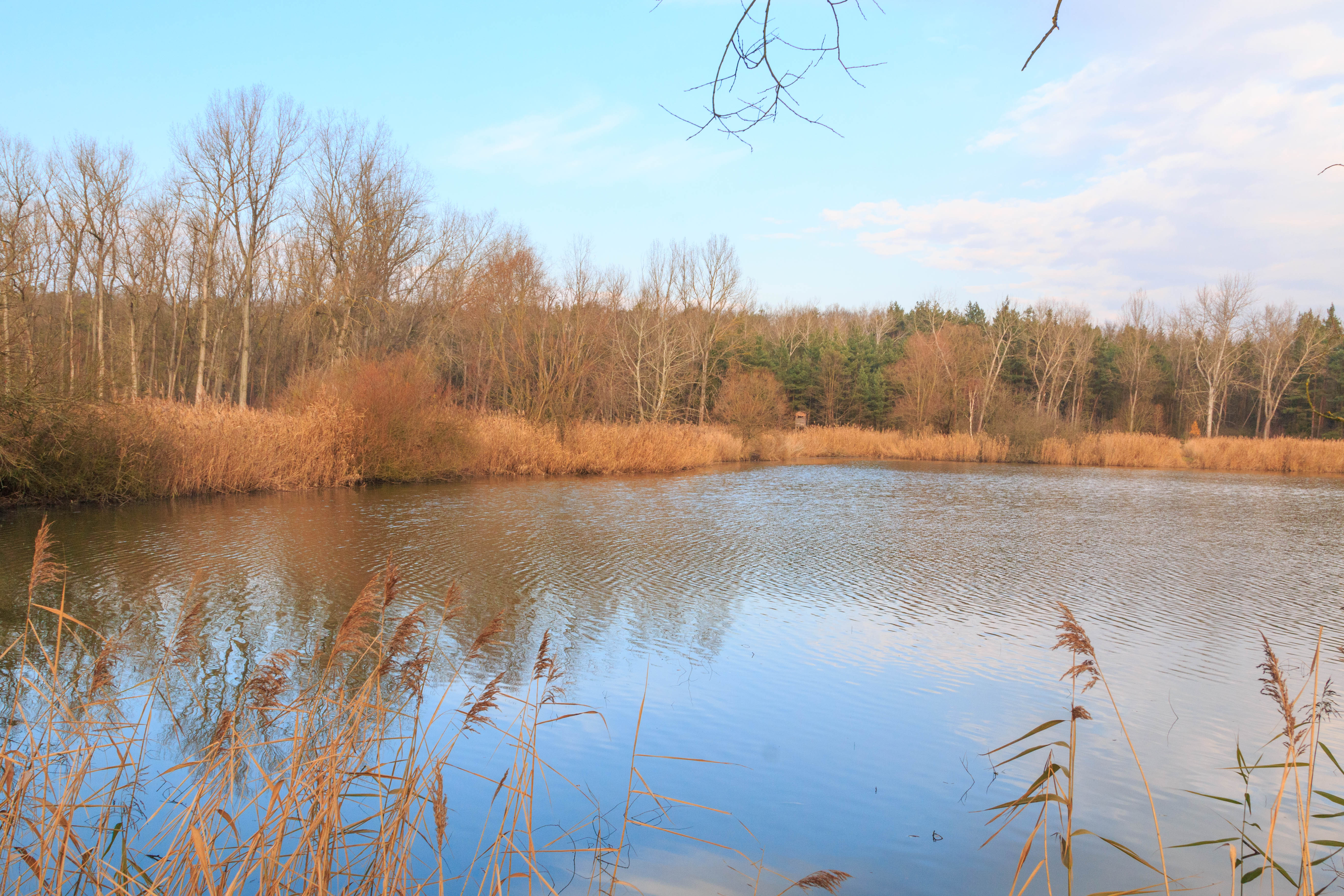 rybník Davídek u Újezdu u Přelouče Project: Vodstvo.